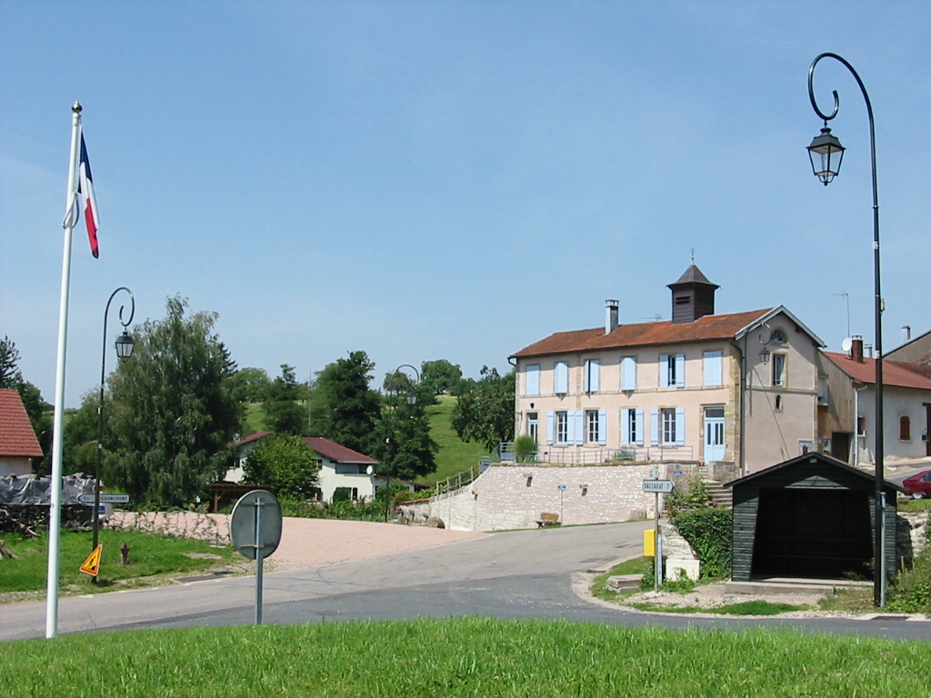 Bazien, commune des Vosges ; la mairie.